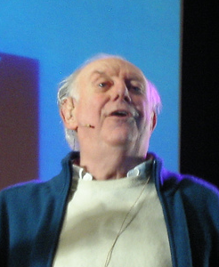 Nobel Prize Dario Fo in Milan